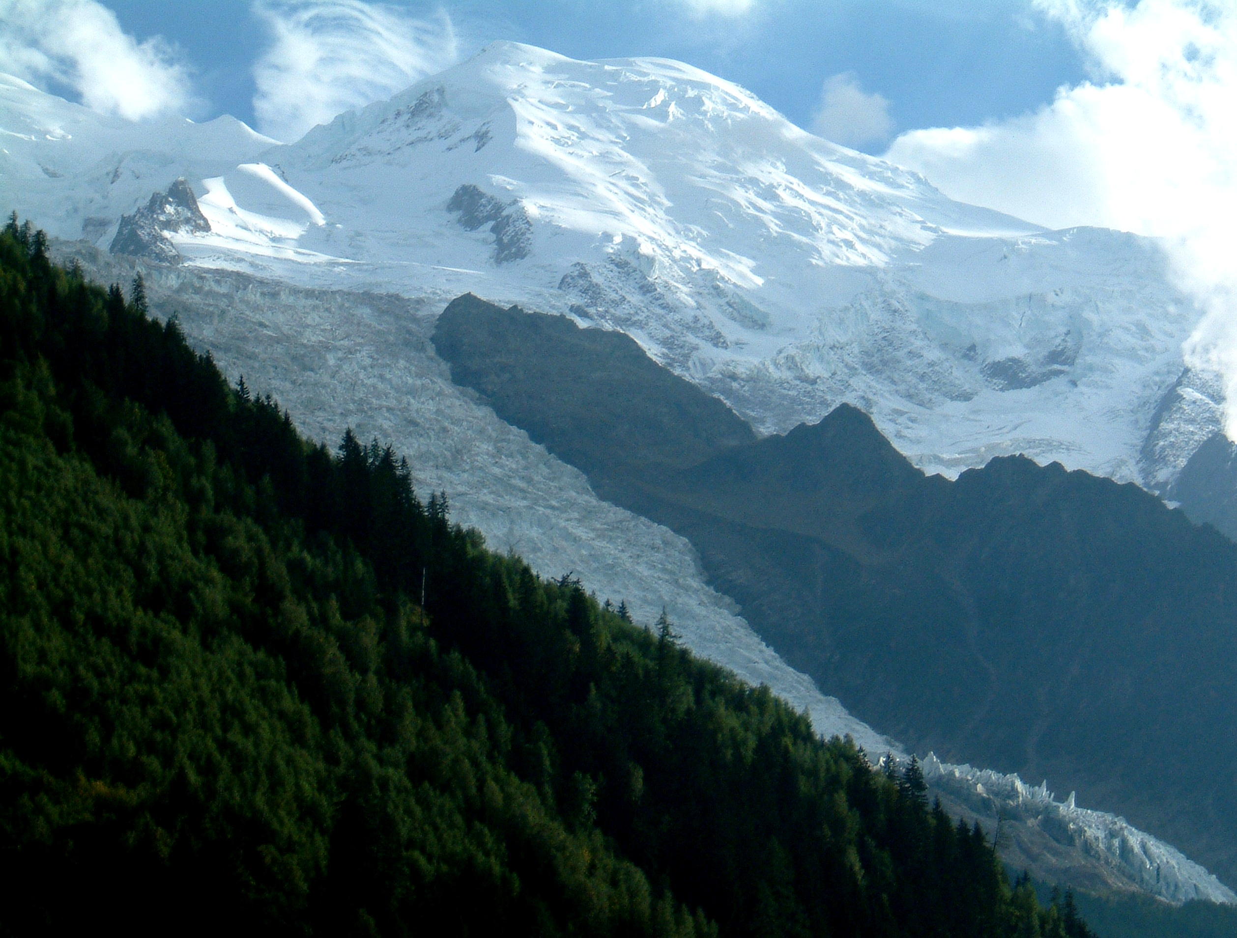 Blick von Chamonix auf das Mont Blanc Massiv (Dôme du Goûter)